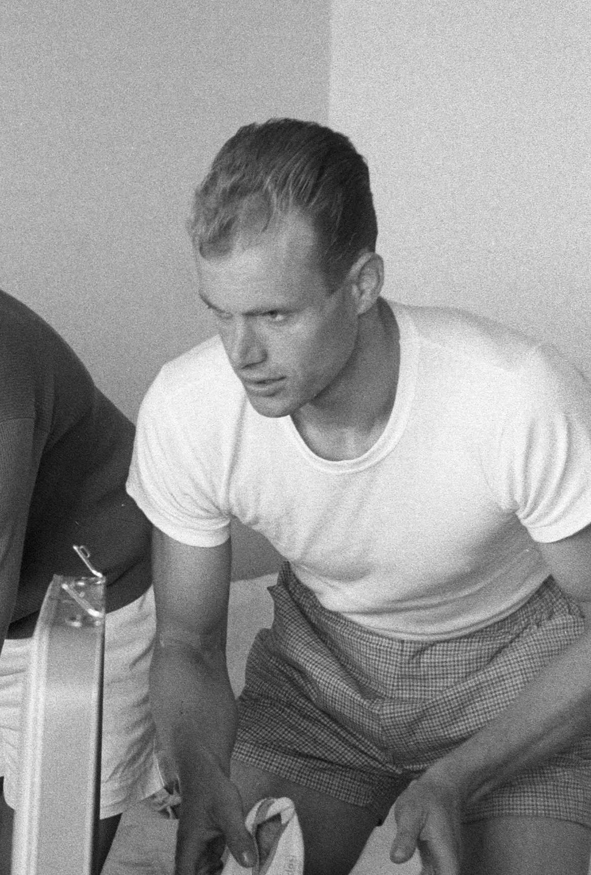 Olympische Spelen te Rome, H. Timme aan het inpakken. Location: Italië, Rome